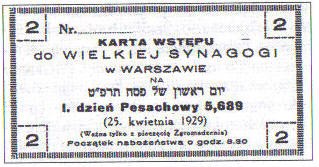 Karta wstępu do Wielkiej Synagogi w Warszawie na pierwszy dzień święta Pesach (25 kwietnia 1929).Entrance pass to the Great Synagogue in Warsaw, from 1929.